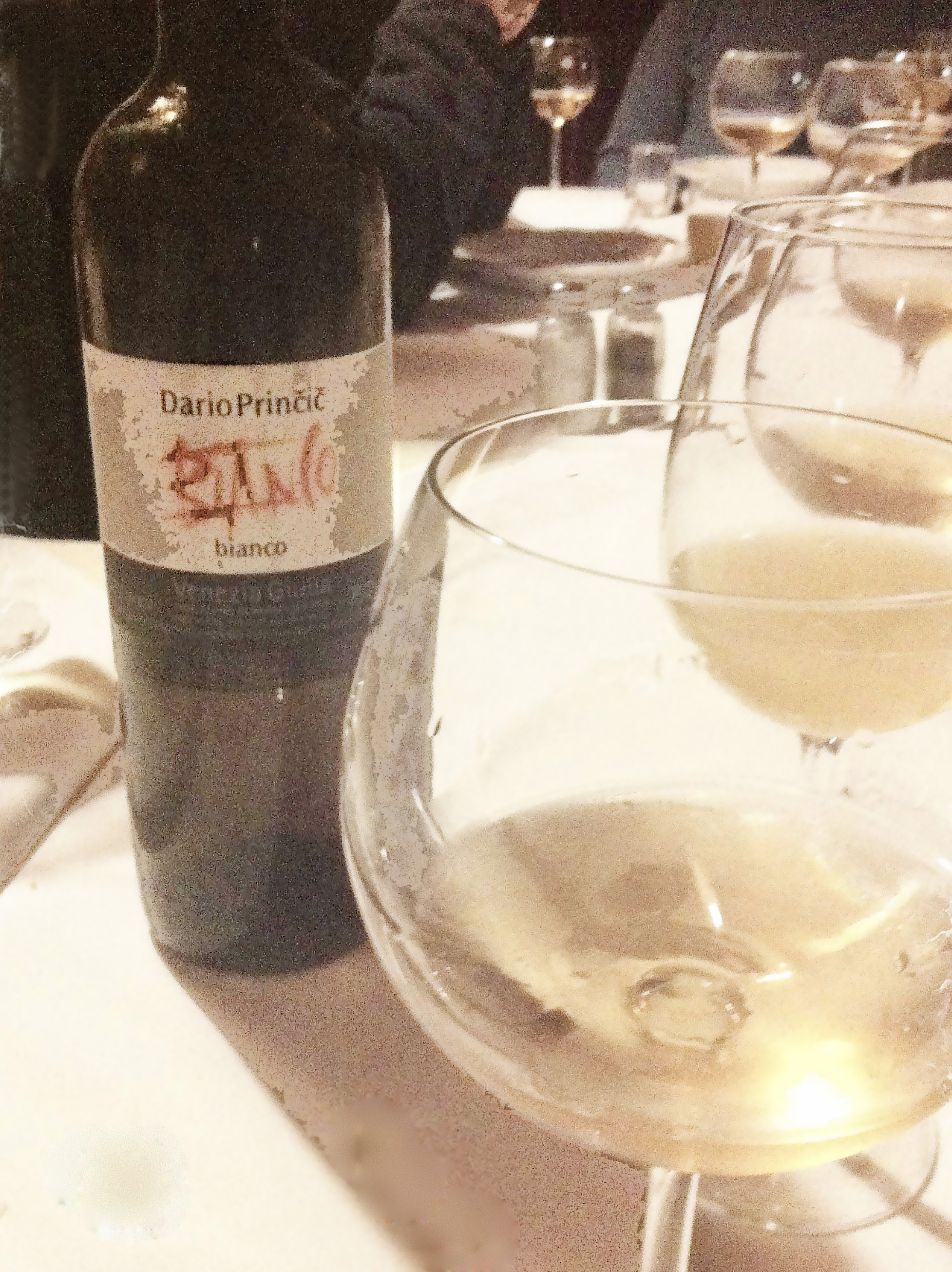 Vin blanc de Dario Prinčič (Venezia Giulia Indicazione Geografica Tipica) servi à Posavje Ljubljana